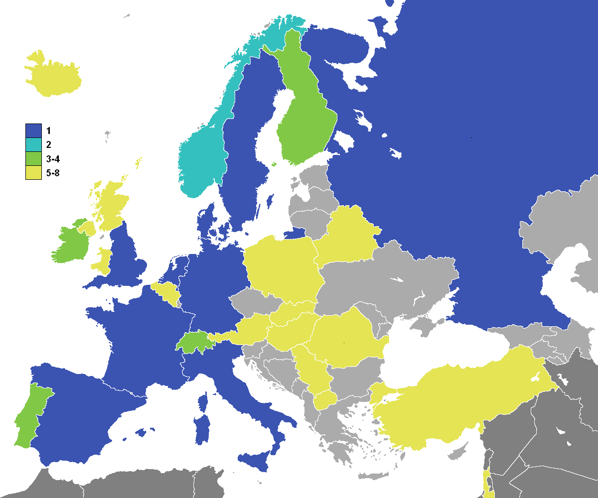 Bestes Abschneiden der Mannschaften bei der U-19-Fußball-Europameisterschaft der Frauen